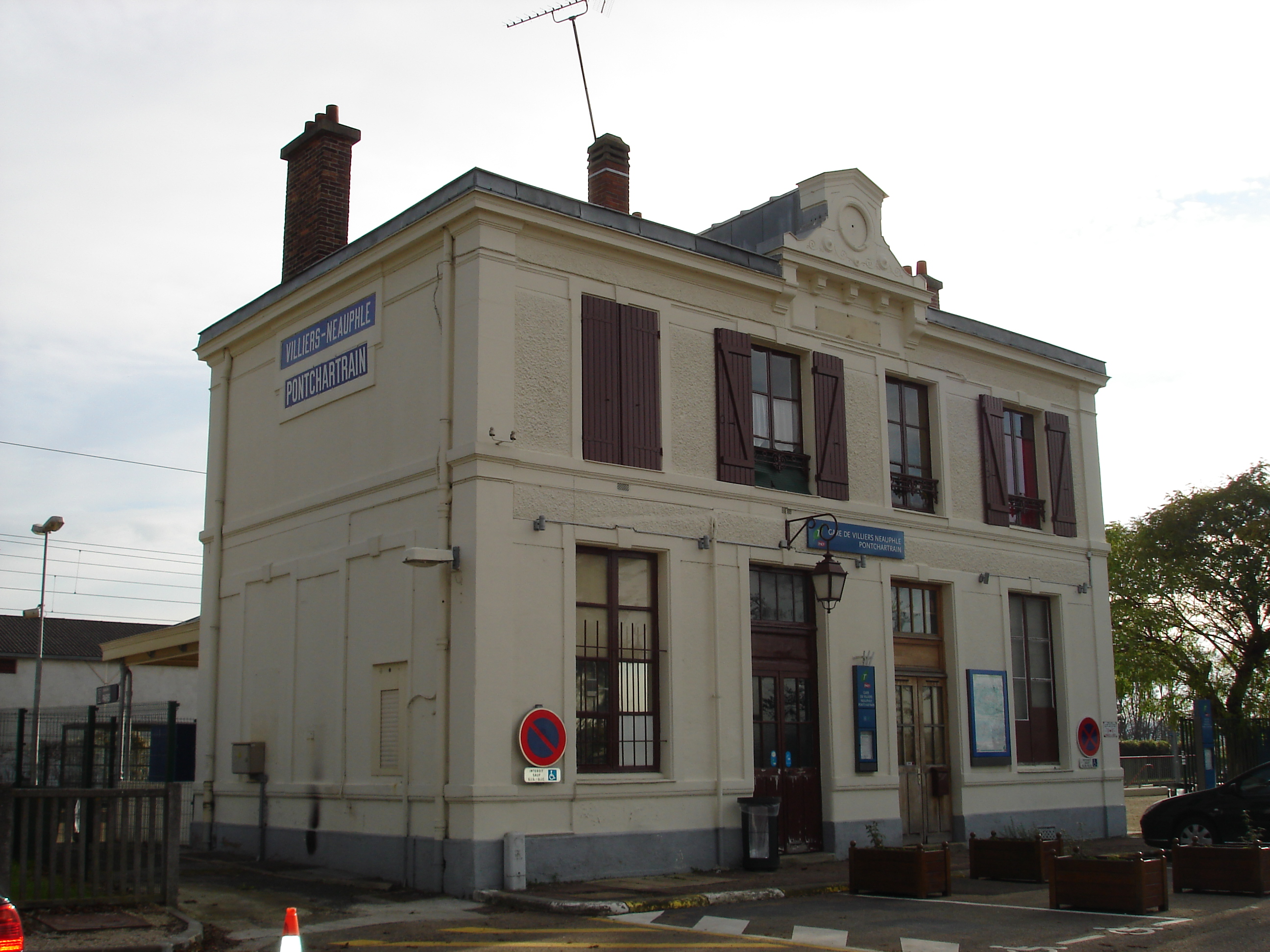 Gare de Villiers - Neauphle - Pontchartrain (78) : Le bâtiment voyageurs.